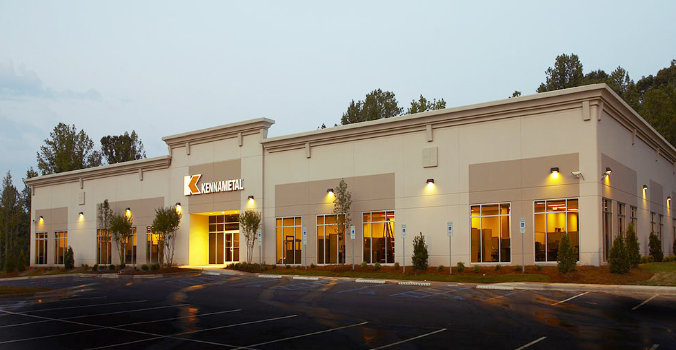 Kennametal Рувир Ruvir инструмент для металлообработки Производитель Токарного, Фрезерного инструмента